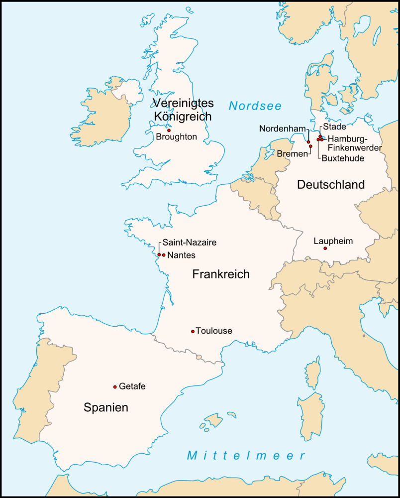 Airbus-Standorte zur Produktion und Fertigung des A380